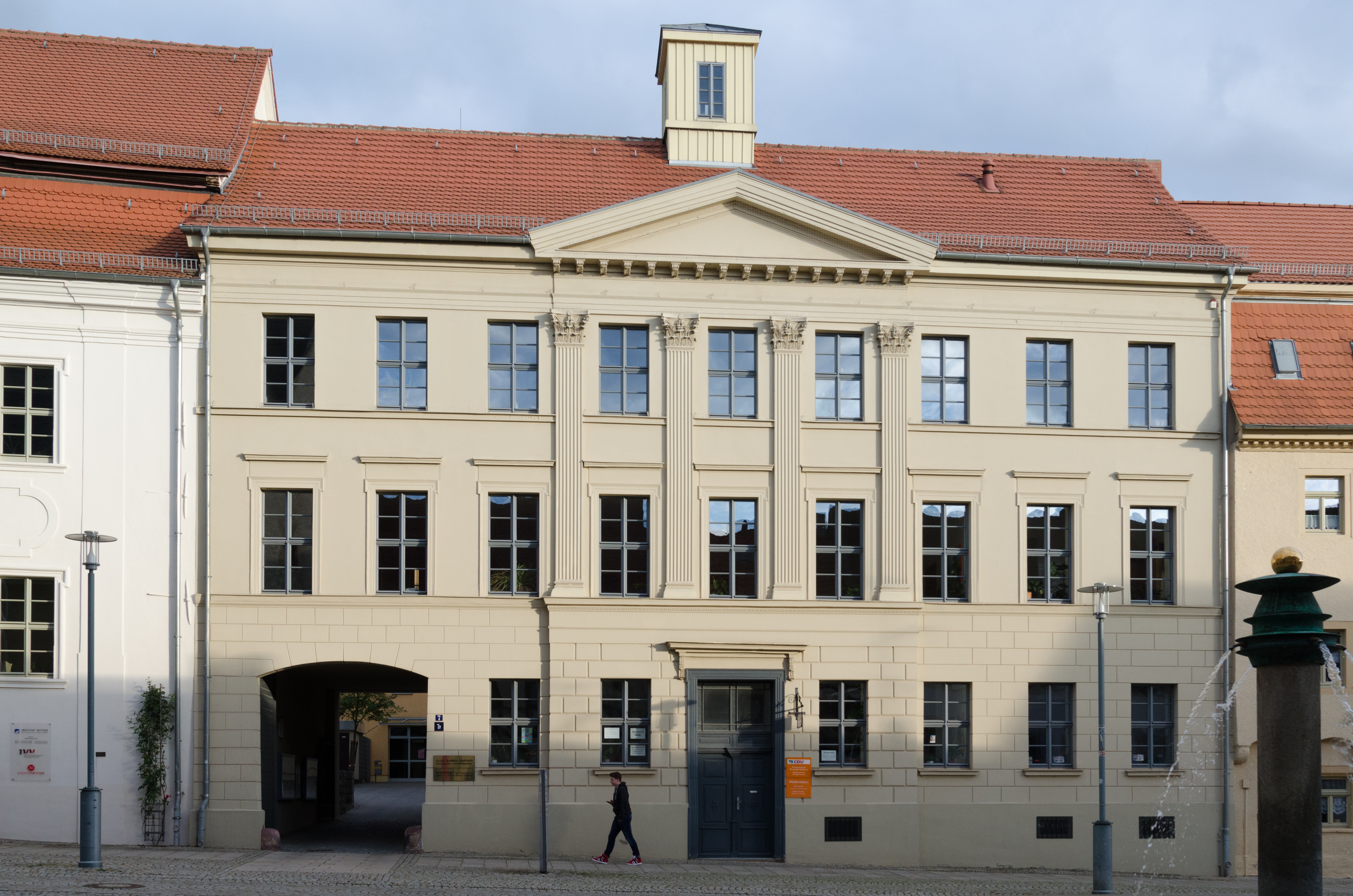 Sangerhausen, Markt 7